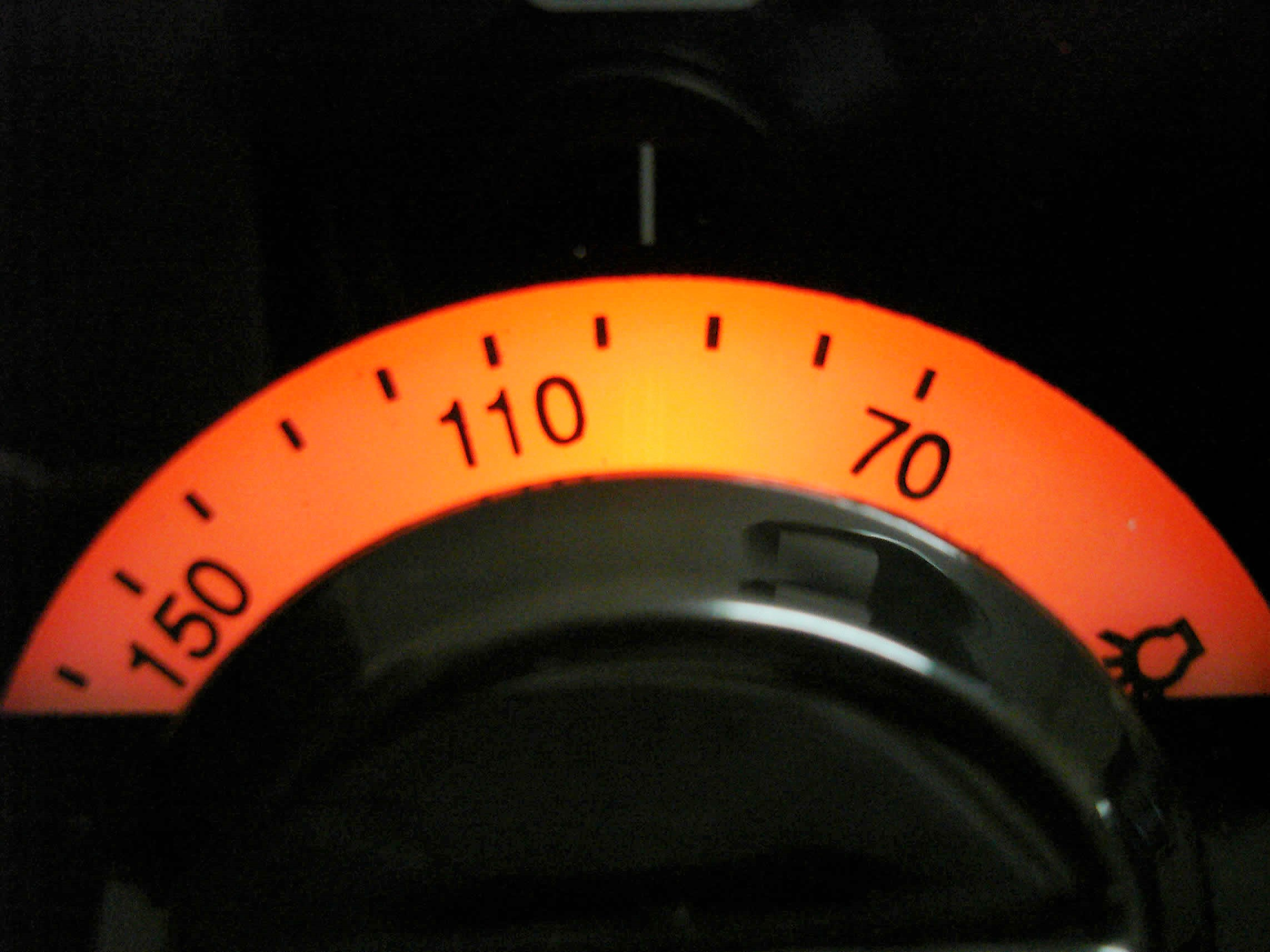 Temperaturregler bei einem Haushaltsbackofen, Anzeige in Grad Celsius (hier auf 95 °C eingestellt).